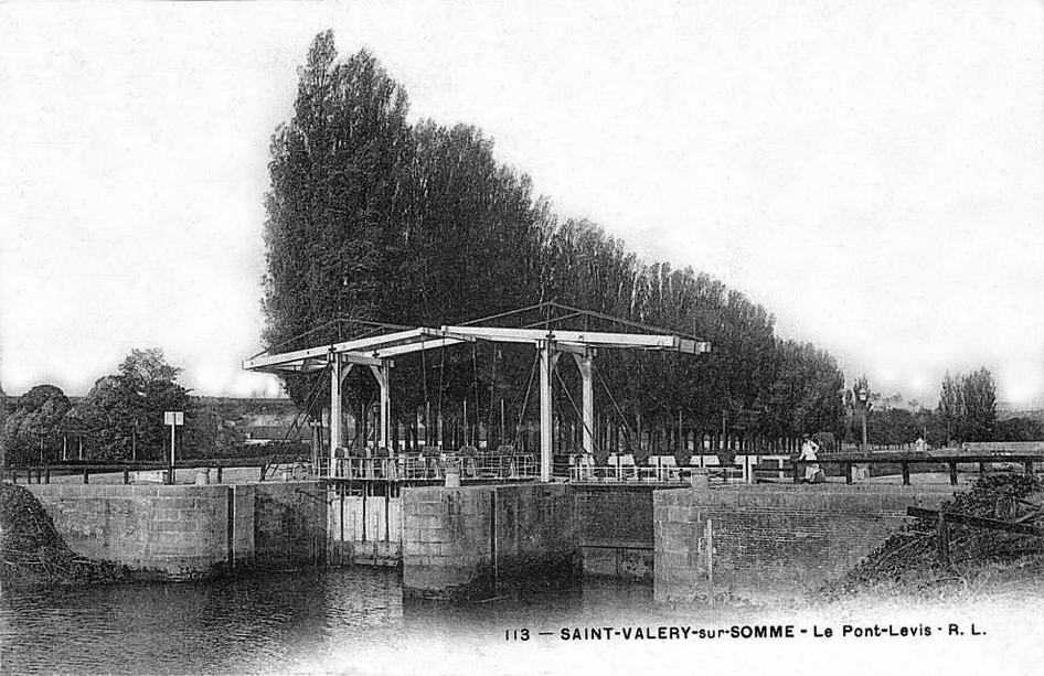 Le double pont-levis sur lequel passe le chemin de fer à la sortie de la gare de Saint-Valery-Canal, vers 1900